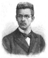 Der deutsche Lithograf unf Fotograf Friedrich Wilhelm Winter (1878-1917)